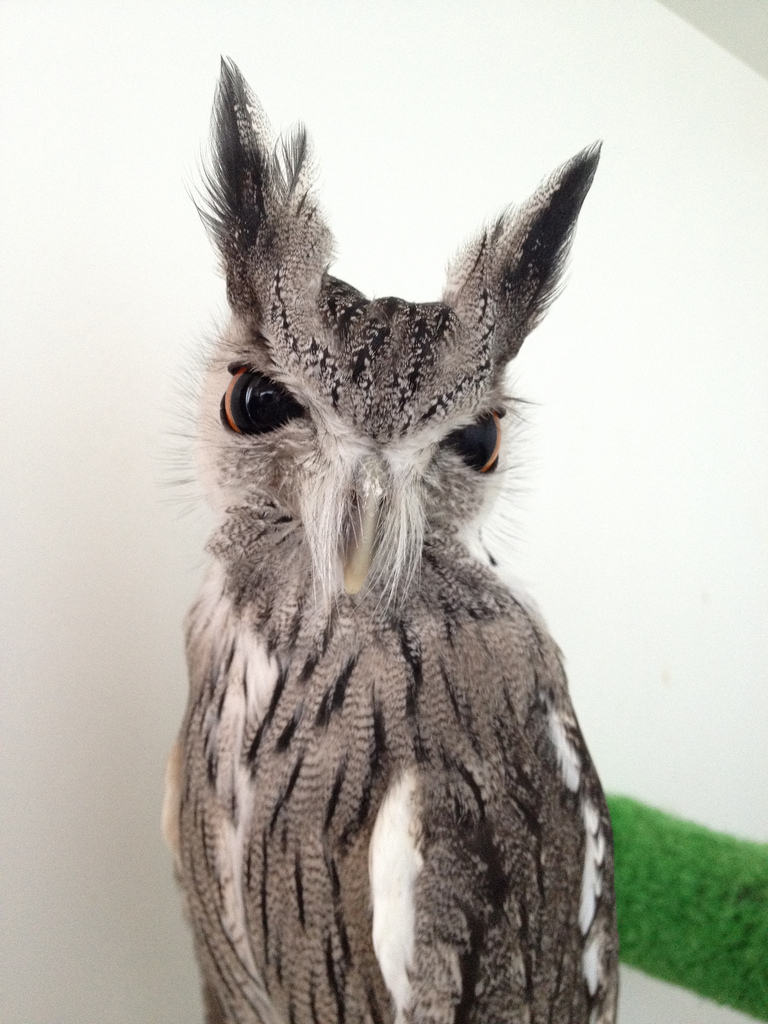 アフリカオオコノハズク